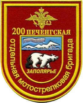 Нарукавный знак 200-й омсбр (Луостари)